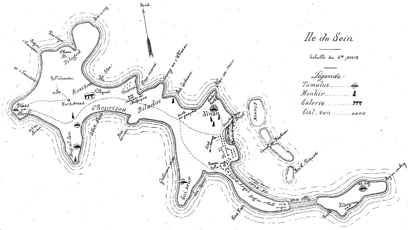 Carte des vestiges archéologiques de l'Île de Sein, par Hyacinthe Le Carguet (Bulletin de la Société archéologique du Finistère, 1897, tome 24)